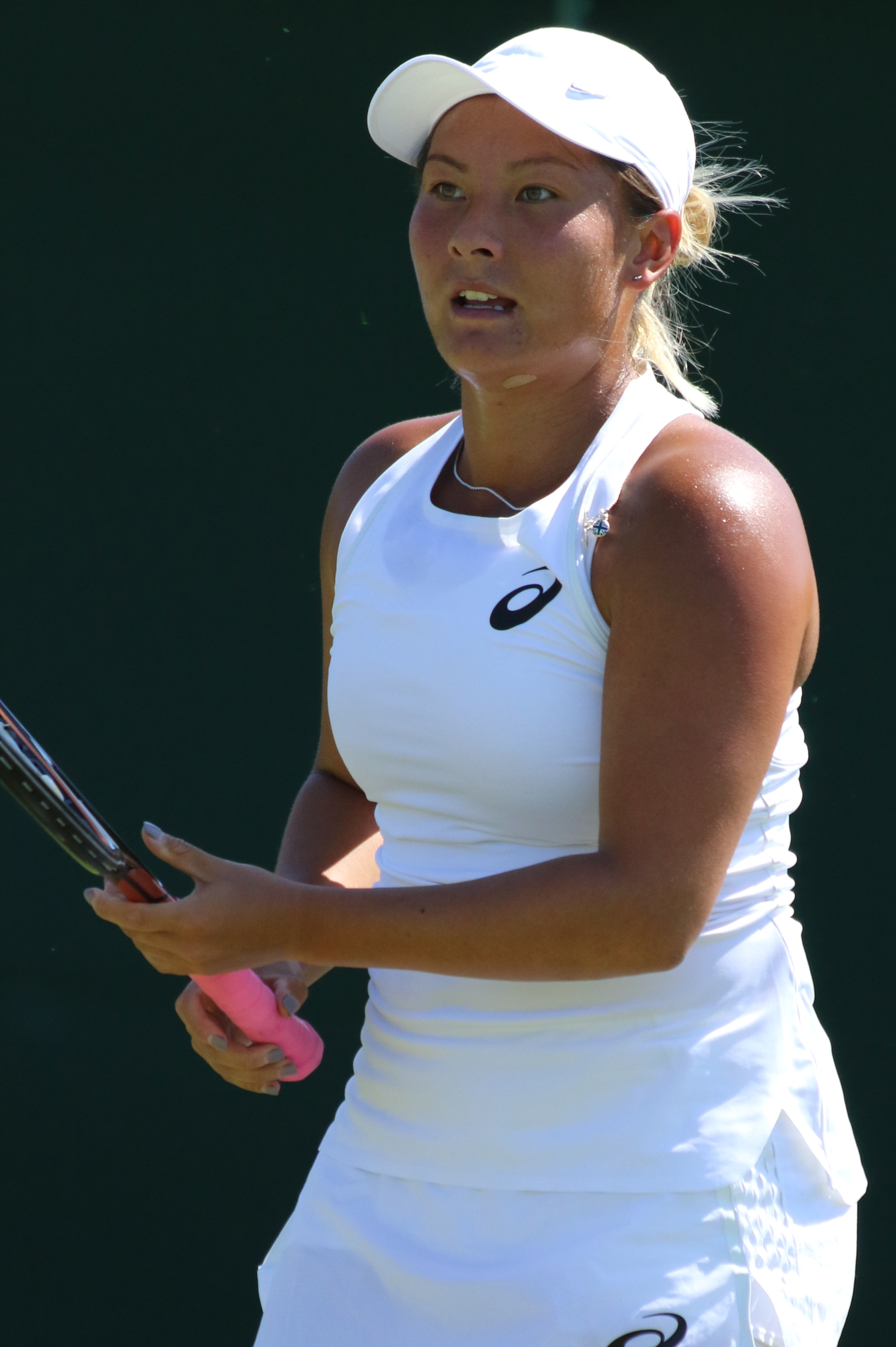 Moore WMQ18 (14)